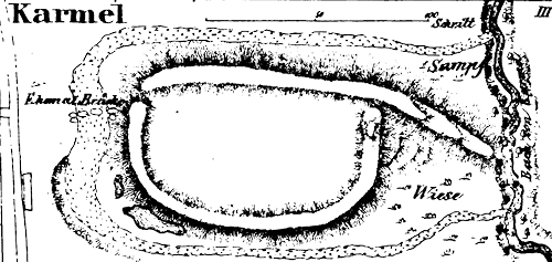 Kaarma maalinn